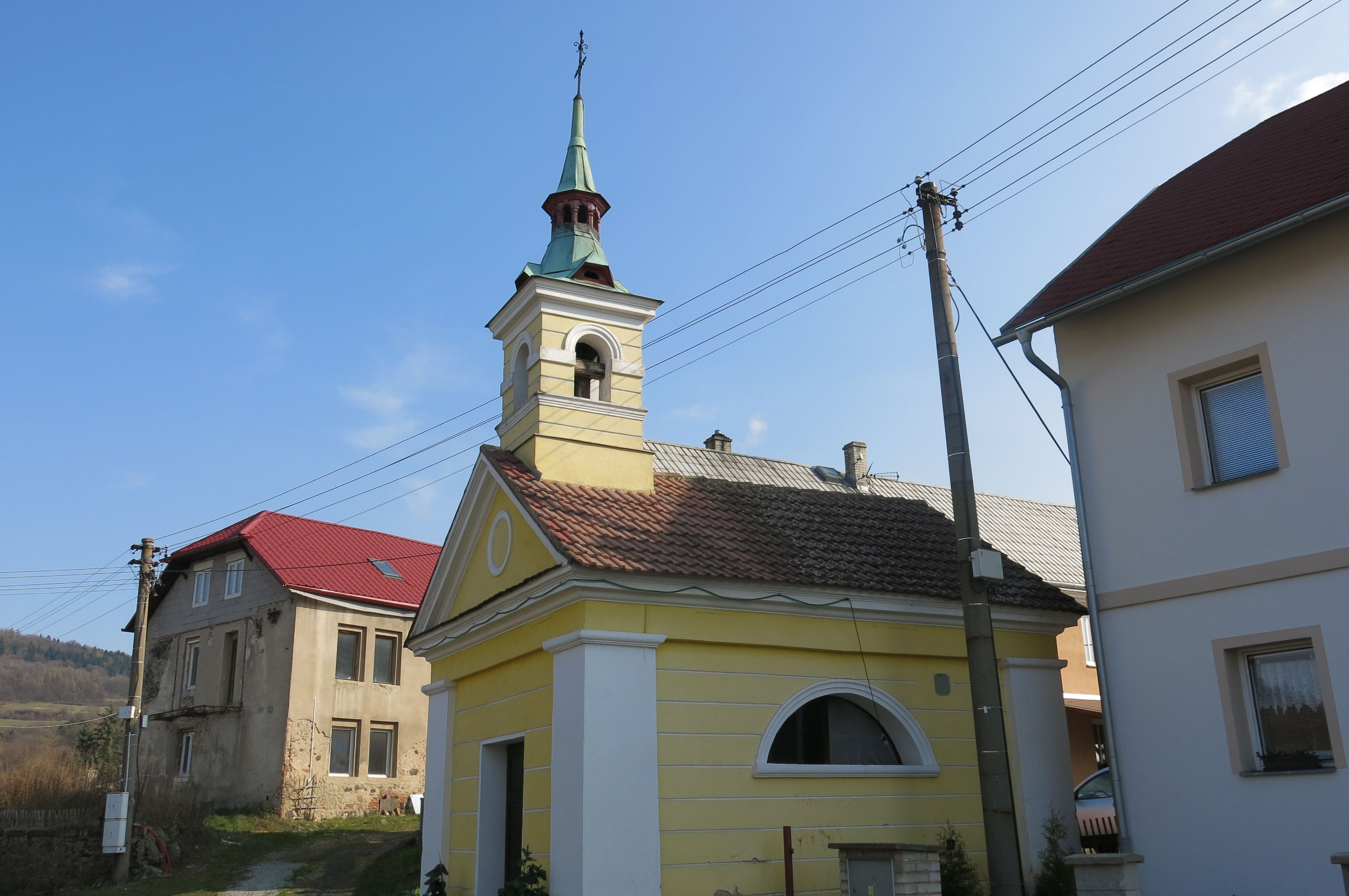 Kaple svatého Prokopa, Chvalov (Stebno).